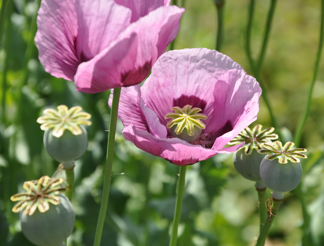 Papaver somniferum subsp. somniferum